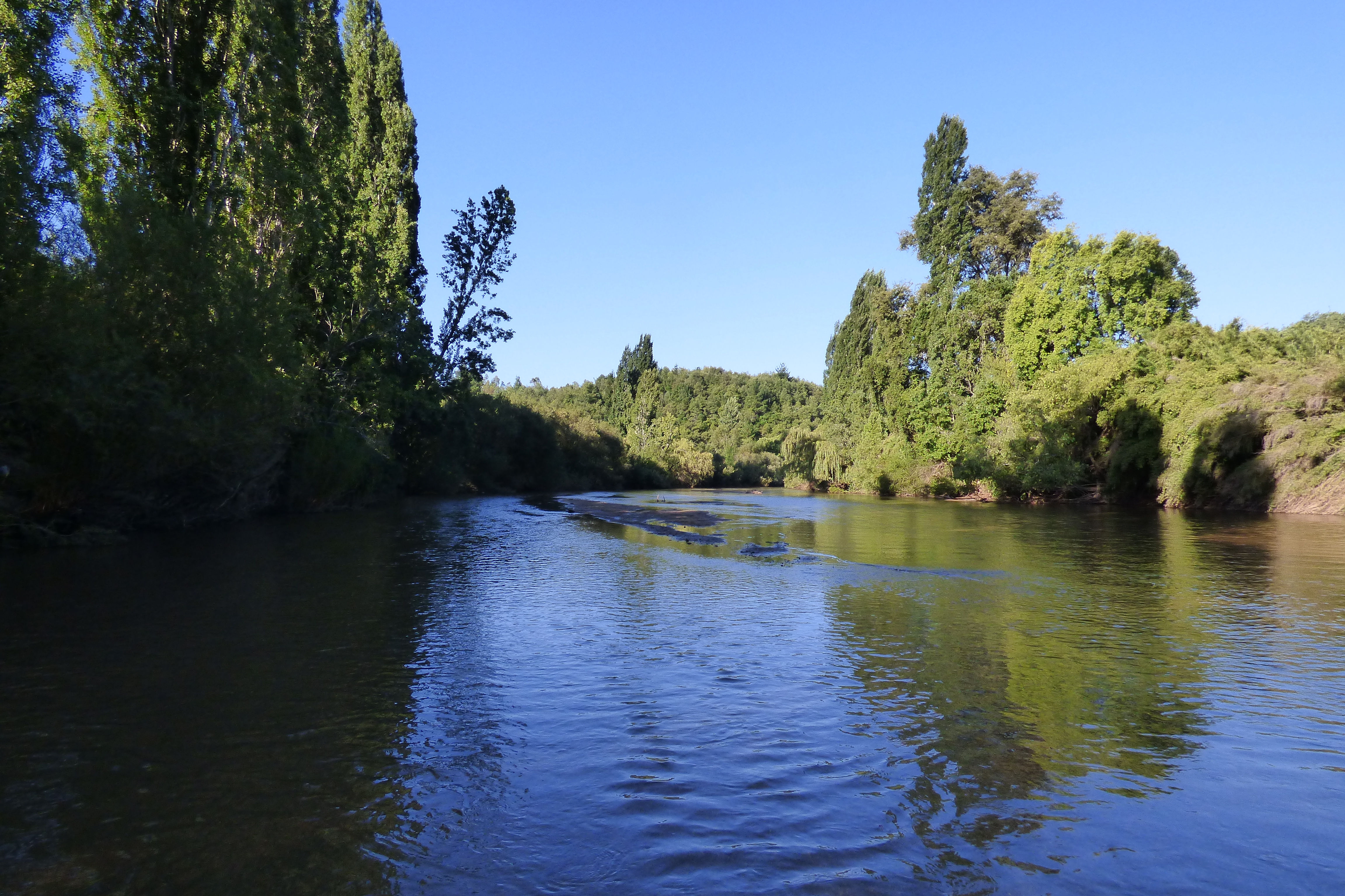 RIO NICODAHUE